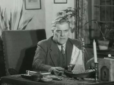 jhr. A.F.C. de Casembroot, commissaris der koningin in Zeeland.